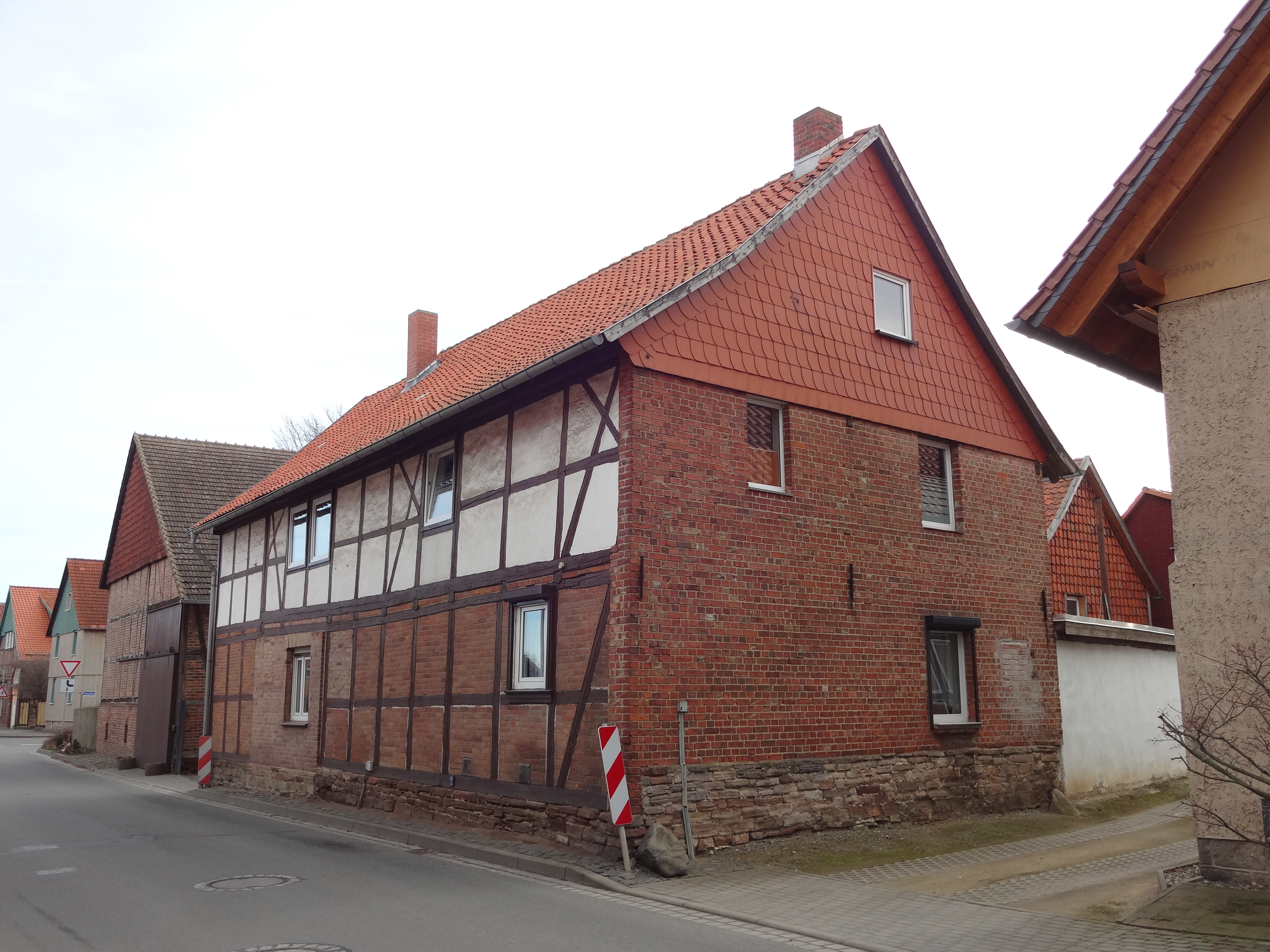 Kulturdenkmal in Minsleben, Ortsteil von Wernigerode